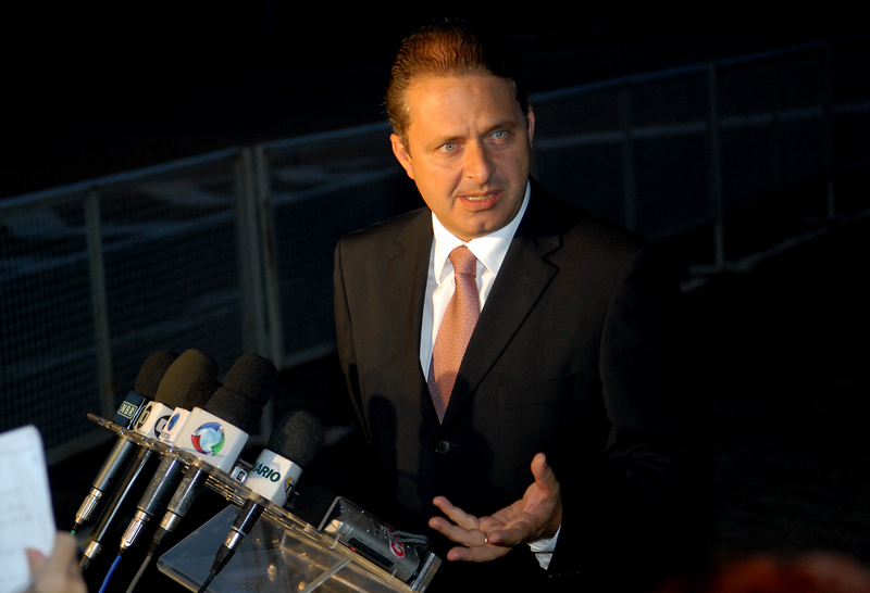 O governador de Pernambuco Eduardo Campos, fala à imprensa após reunião com o presidente Lula sobre a Ferrovia Transnordestina.